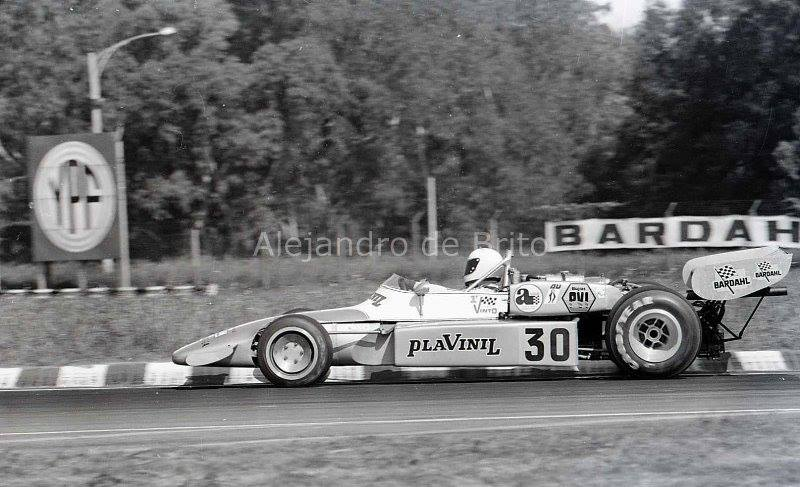 Néstor García Veiga (Berta-Tornado), F1MA 1973.